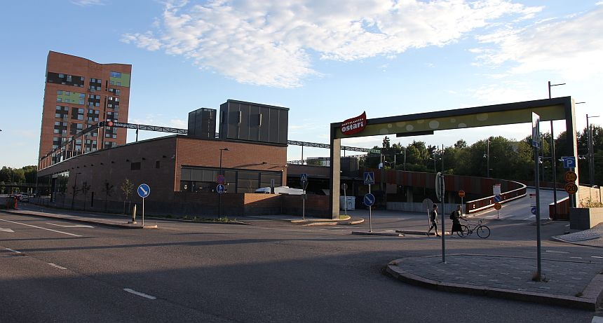 Martinlaakson ostari. Sijainti Martinlaakson rautatieaseman itäpuolella. Vantaa. Huom: Muista säilyttää viittaus kuvaajaan, mikäli käytät kuvaa.